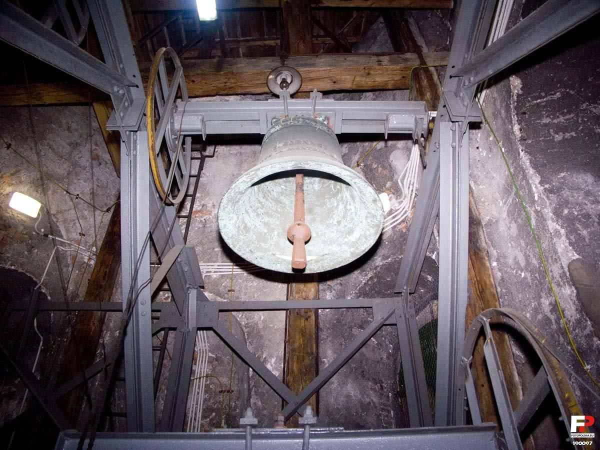 Dzwon Joannes, czyli Jasio!;-) Jeden z zachowanych poniemieckich.